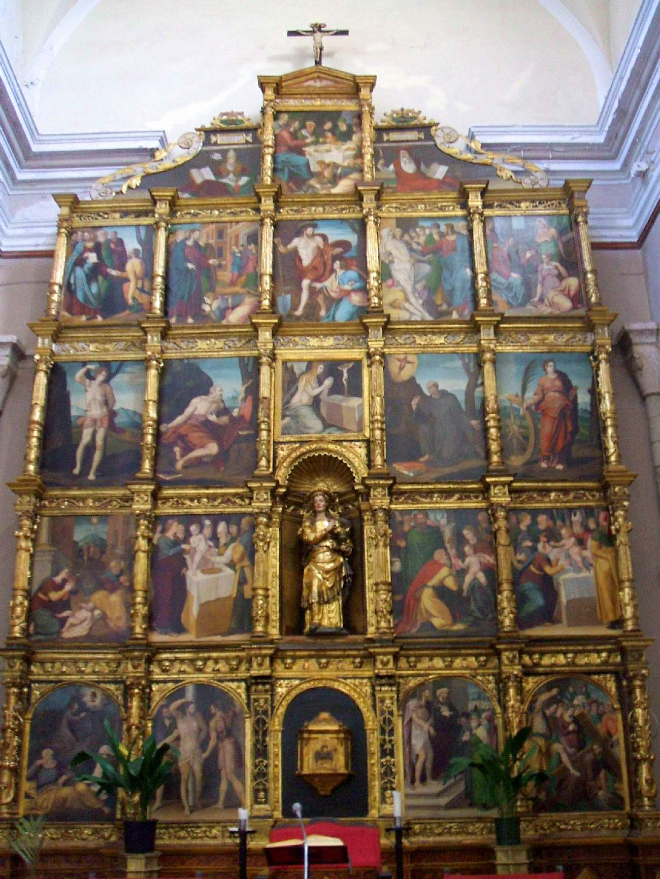 Iglesia de Santa María Magdalena, Tarazona (Zaragoza)